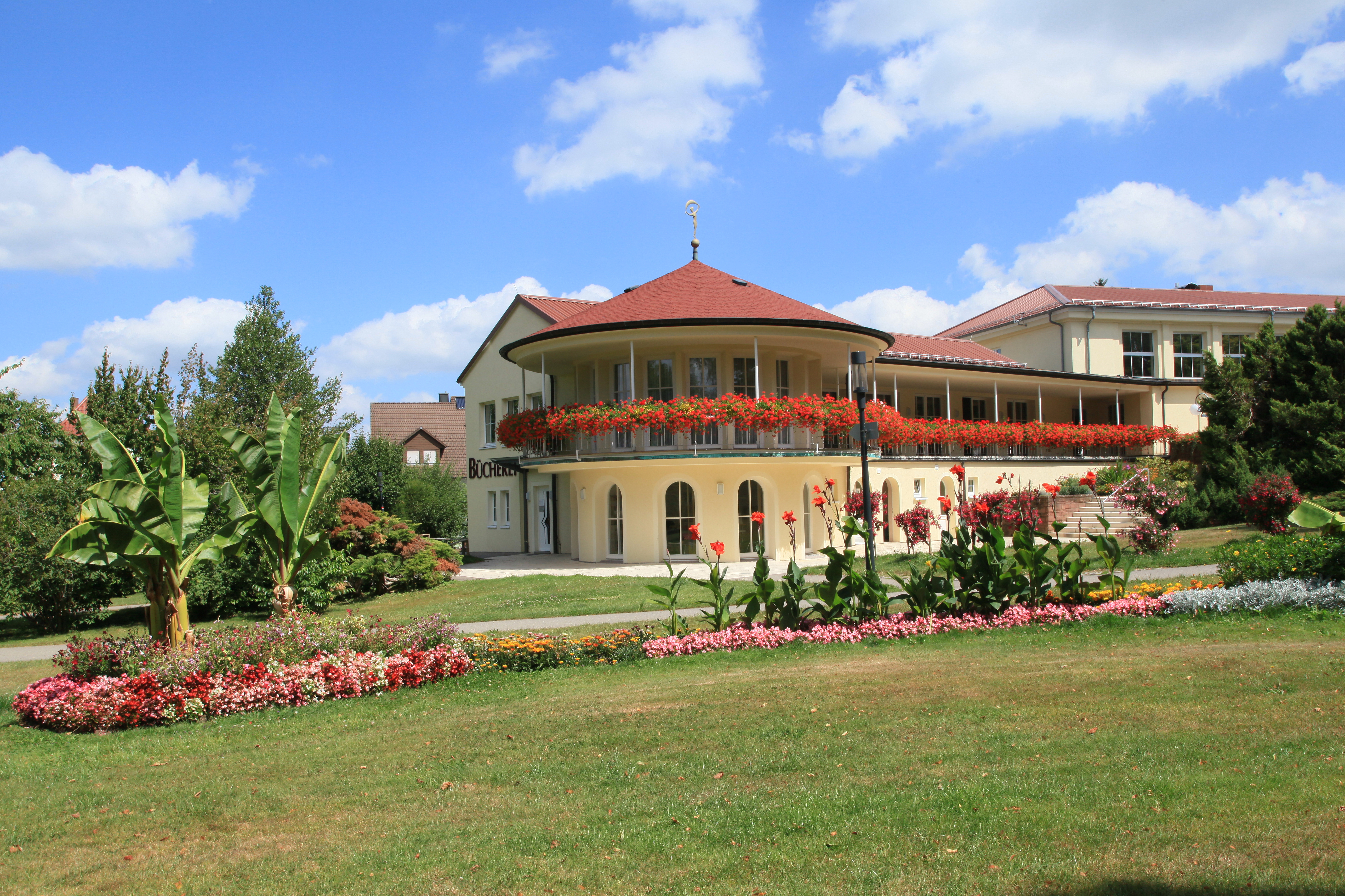 Kurhaus im Kurpark, Schwarzwaldstraße in Schömberg (Landkreis Calw)